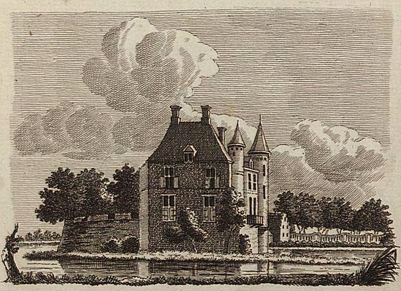 (Tweede) Reize door de majorĳ van 's Hertogenbosch in den jaare 1799. Titelpagina.